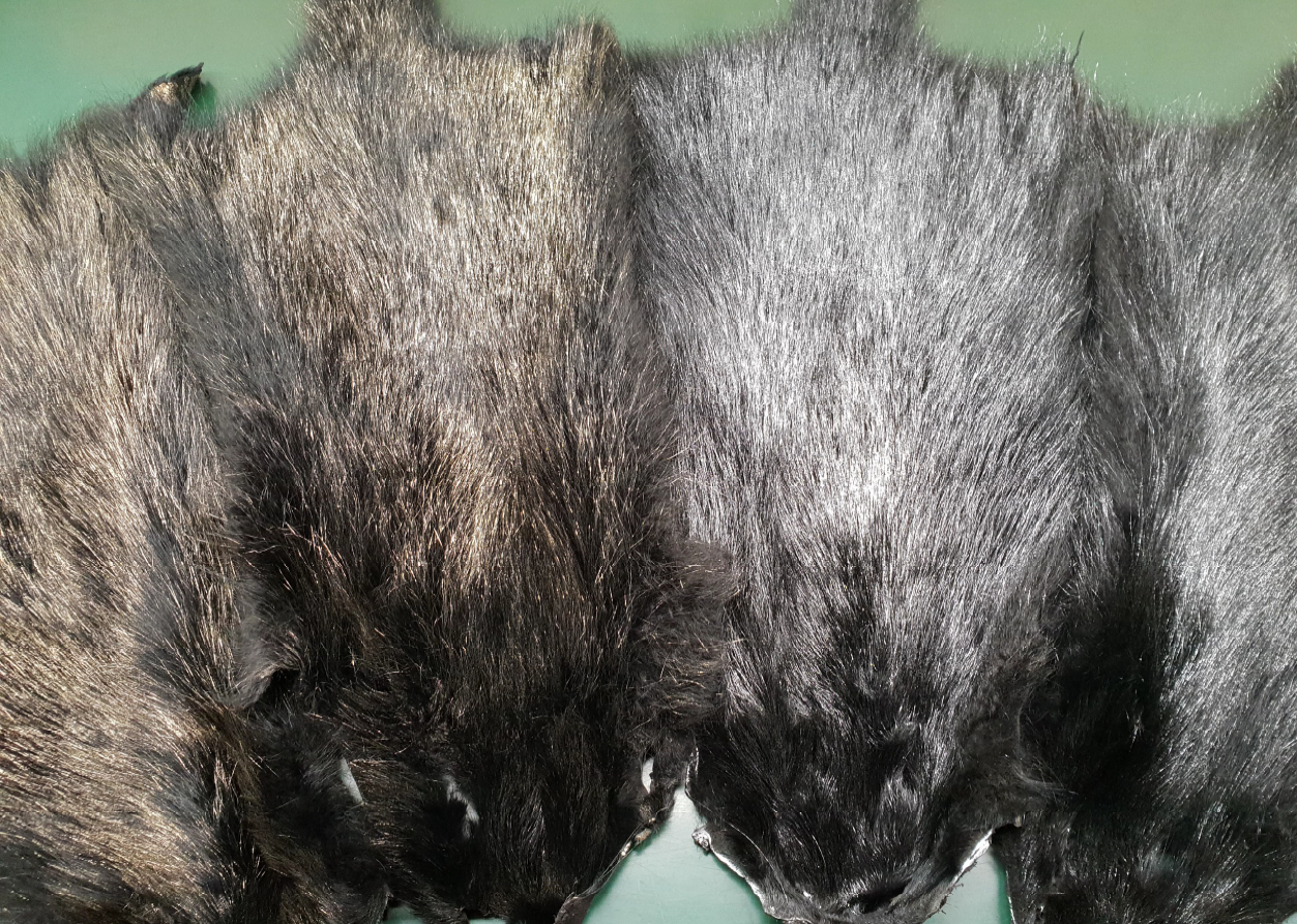 Schwarz gefärbte Waschbärfelle mit Gold- und Silbertips. Gesehen bei Firma Hermann Kanus, Frankfurt am Main, Oktober 2018.